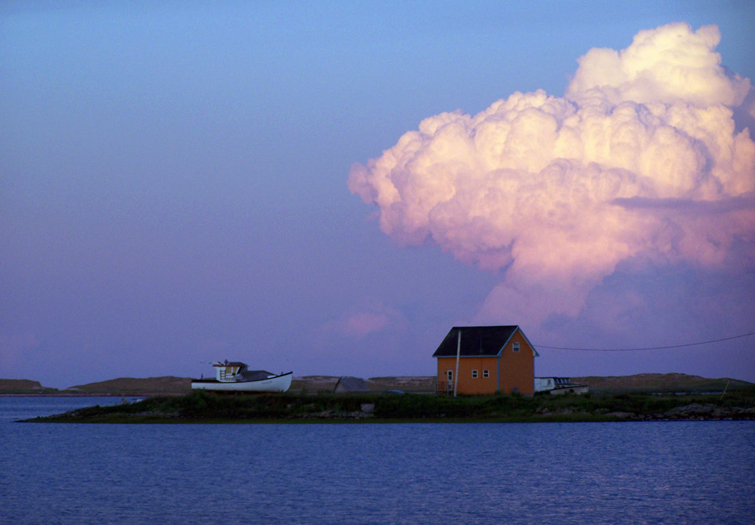 Maison construite par Gaston Gaudet avec le bois restant des ruines des Fumoirs abandonnés. Chemin des Fumoirs, Havre-aubert, Îles-de-la-Madeleine